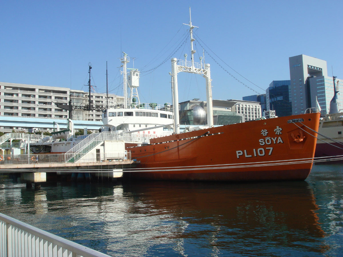 宗谷 (船) 船の科学館にて投稿者撮影 2006/11/25